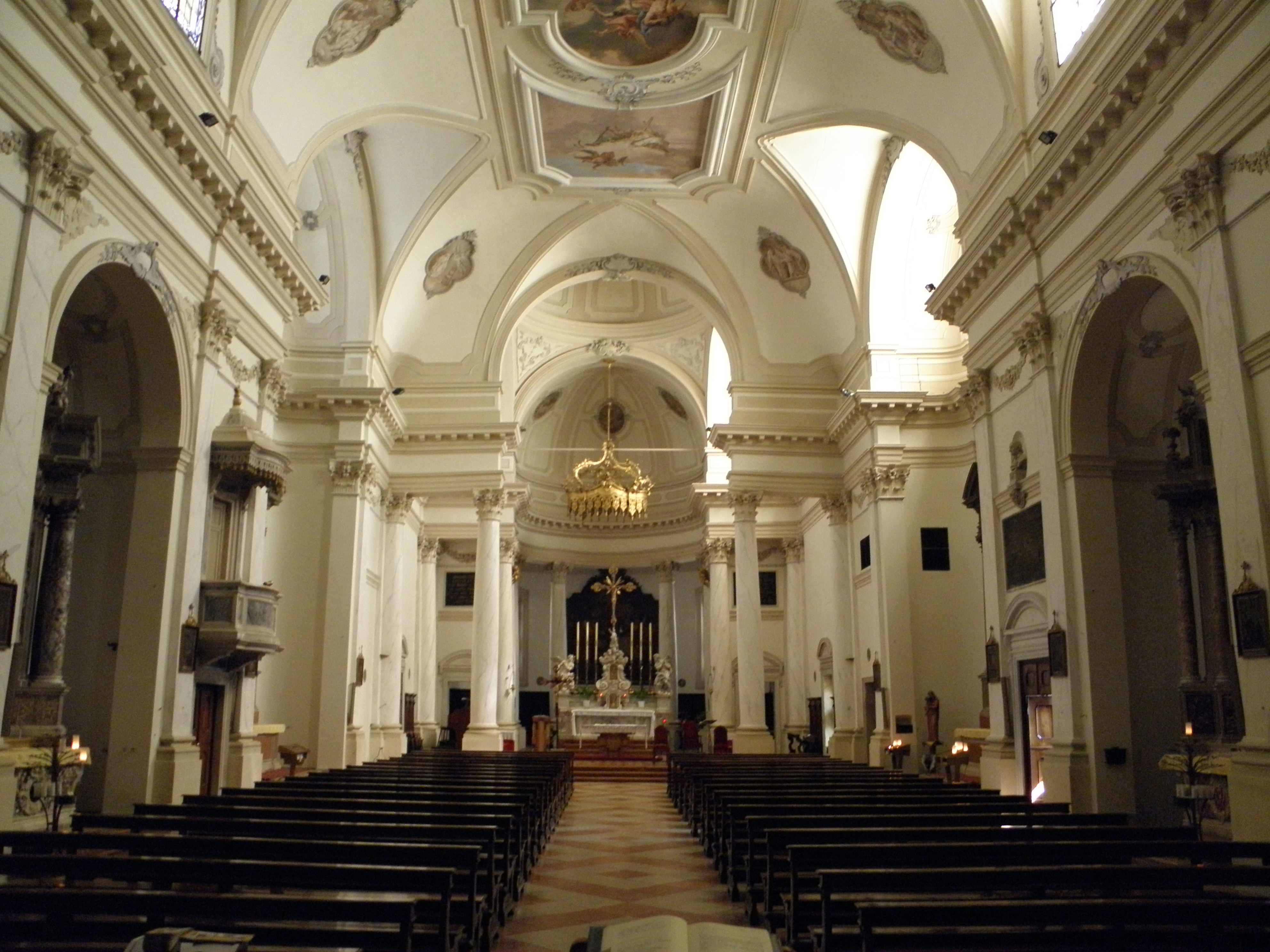 Villanova del Ghebbo: vista dell'interno della chiesa di San Michele Arcangelo.